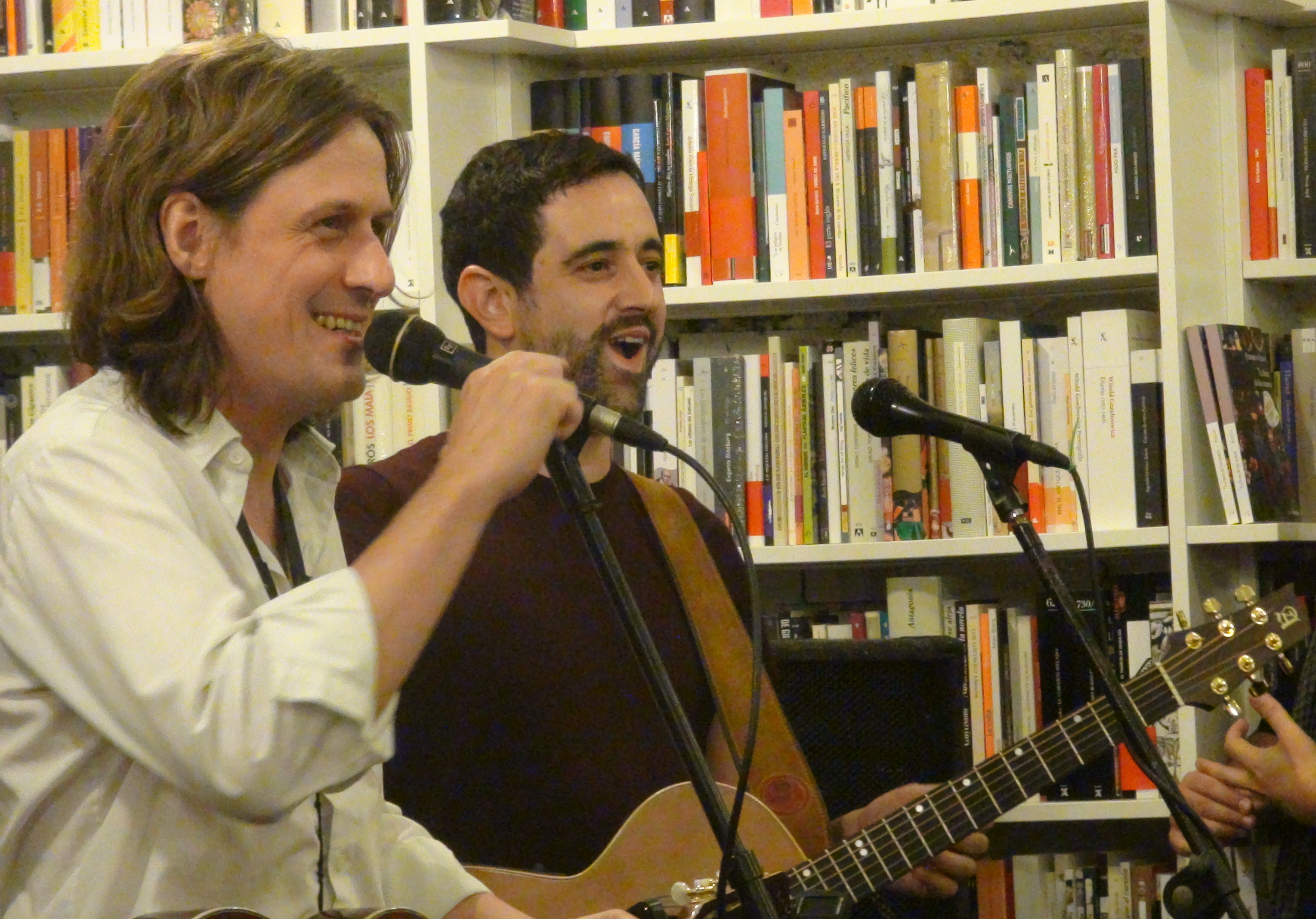 Actuación en la presentación del libro "El comité de la noche" de Belén Gopegui. Madrid 2014